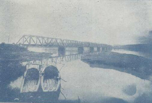 刊名： 铁展 出版周期： 刊期不详 出版年份： 1934 主办单位： 铁道部全国铁路沿线出产货品展览会出版 出版地： 北京